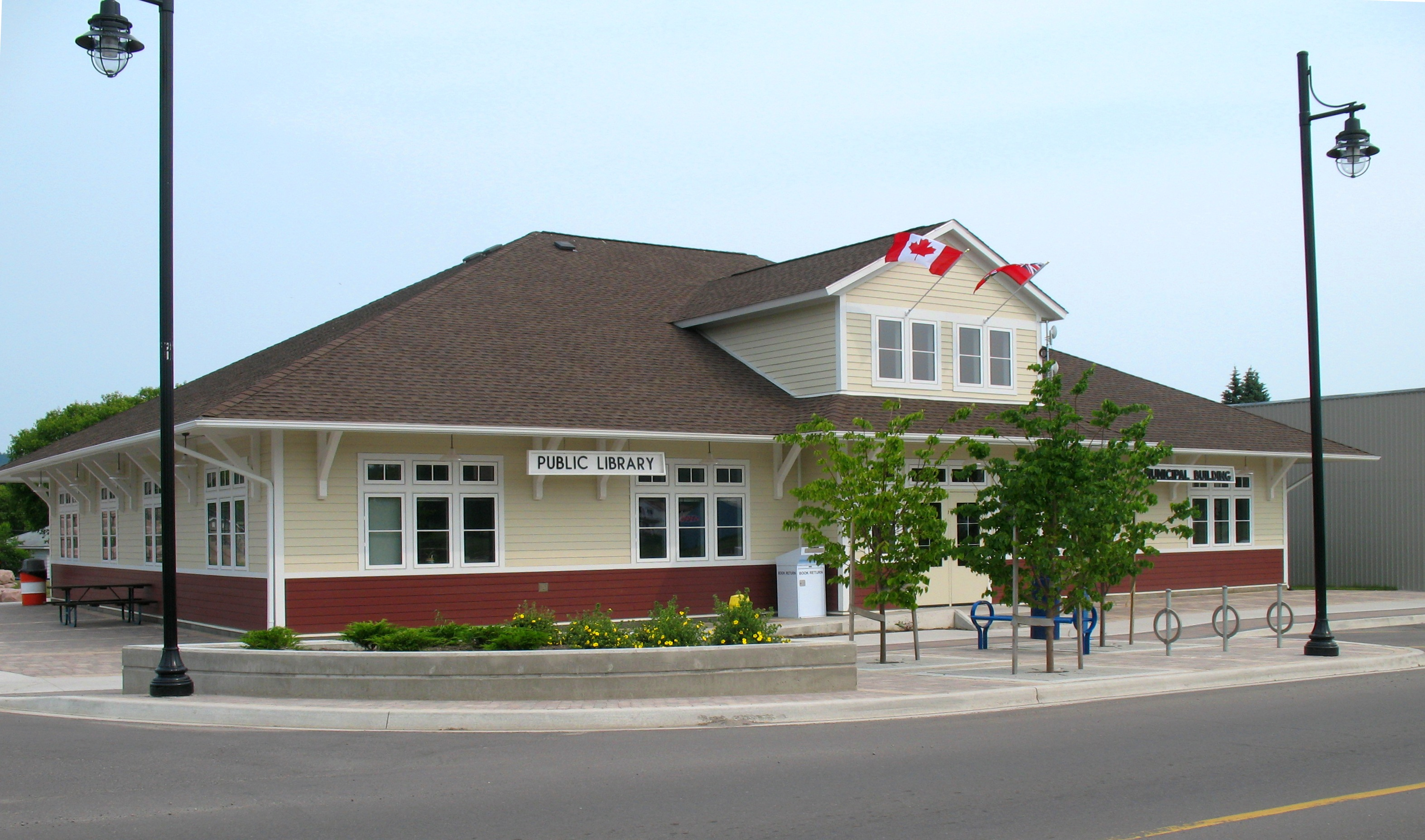 Öffentliche Bibliothek in Nipigon, Nord-Ontario, Kanada